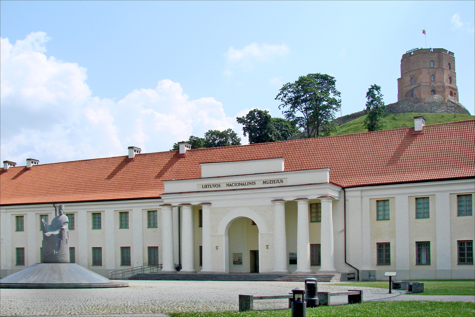 En commémoration du 750e anniversaire du couronnement de Mindaugas, une statue du Roi Mindaugas (sculpteur R. Midvikis) a été dévoilée en juillet 2003. Le Roi est représenté assis sur le trône, tenant les insignes royaux : le sceptre et une boule avec une croix. Le socle de la statue est entouré par un cadran solaire, sur lequel sont mentionnées les fêtes païennes et chrétiennes les plus importantes. Extrait du site sur Vilnius Au fond, l'entrée du musée national de Lituanie dans le nouvel arsenal En haut à droite, la tour de Gediminas à laquelle on accède par un funiculaire.